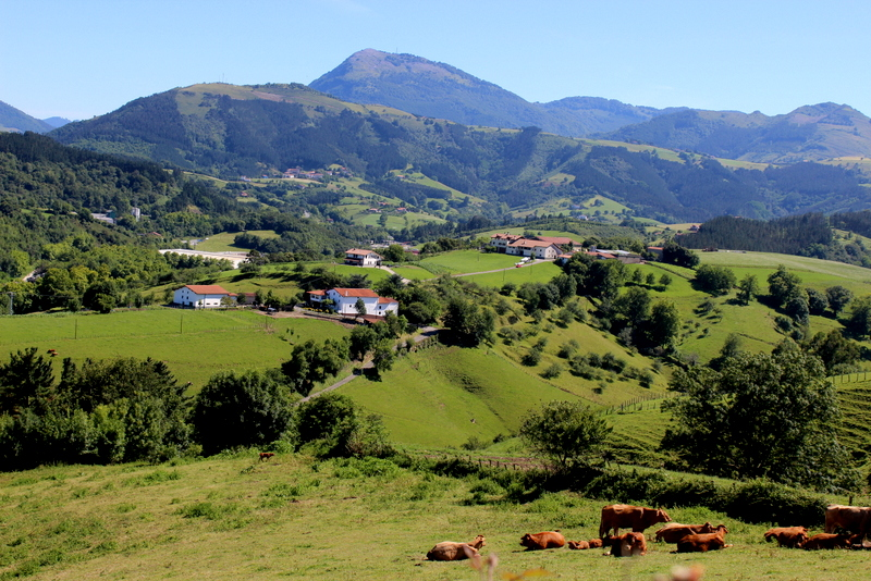 IZARRAITZ MENDIA ZUMAIATIK IKUSITA Irudi hau Wikibizi kanpainaren baitan igo da, Euskal Wikilarien Kultura Elkarteak 2020an deitutako argazki lehiaketa hirukoitza. Helburua, Euskal Herria hobeto ezagutzen laguntzea da.Lagundu zuk ere irudi hau dagokion artikuluetan txertatzen.